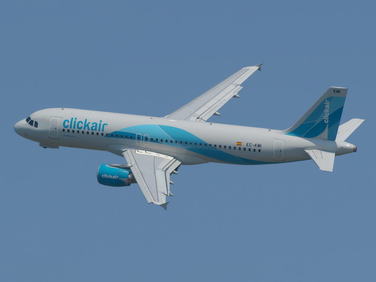 Airbus A320-216 Clickair cn 3400 Entregado en Febrero de 2008 Para evitar el ruido a los vecinos de Gava Mar, los aviones que salen del Prat (España) se ven obligados a hacer un virage bastante pronunciado.